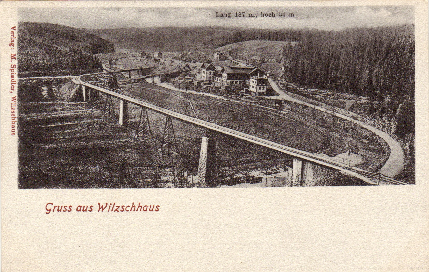 Wilzschhaus: Das Brückensystem, bedingt durch das Zusammentreffen der beiden Bahnstrecken Bahnstrecke Chemnitz–Adorf und Schmalspurbahn Wilkau-Haßlau–Carlsfeld und der Notwendigkeit, dass erstere Bahnlinie von der zweitgenannten überquert werden muss. Zusätzlich müssen beide über die Zwickauer Mulde geführt werden. Dies bedeutet, dass nicht weniger als vier zusätzliche Brücken zu der vorhandenen Muldenbrücke der 1875 eröffneten Linie Chemnitz-Adorf notwendig wurden, als im Jahr 1893 die Schmalspurbahn ihren Verkehr bis Wilzschhaus aufnahm. Die längste Brücke (im Vordergrund) war die, auf der die Schmalspurbahn die Mulde überquerte und aus dem Tal des Silberbachs von hohem Niveau auf das der Mulde herabgeführt werden musste. Nach kurzer Fahrt über einen Damm folgte die Brücke über die Regelspurbahn, dann erneut eine über die Mulde, die schließlich vor der Fahrt in das Tal der Wilzsch erneut mit einer Brücke überquert werden musste.